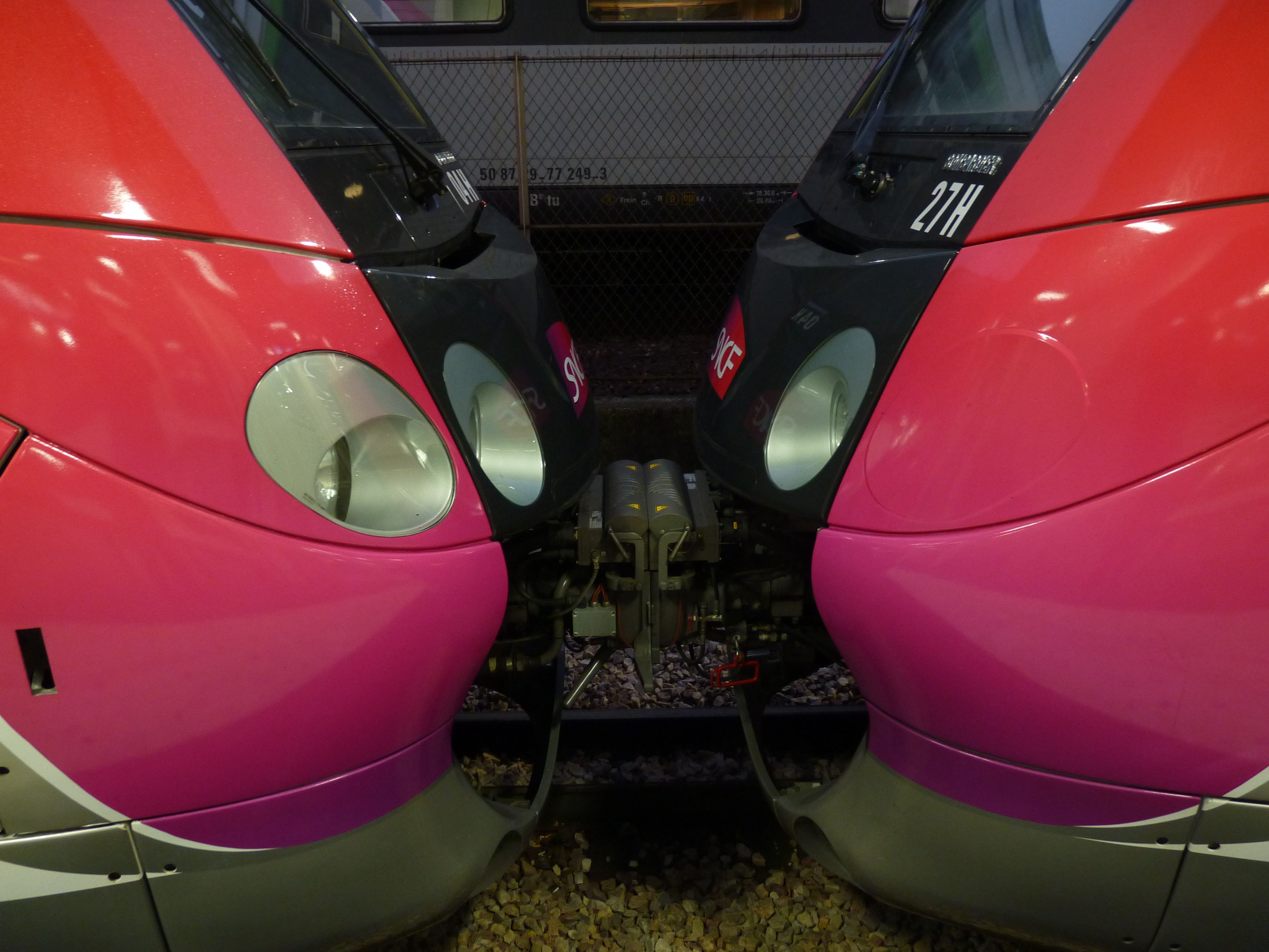 Détail de l'accouplement entre la Z 50007-08 et la Z 50053-54 en gare de Paris-Nord.